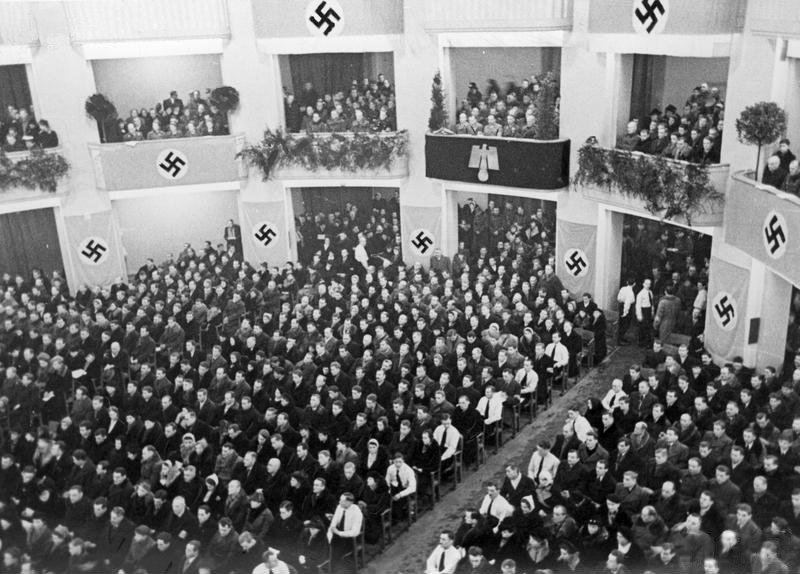 Wiec warszawskich volksdeutschów w sali "Roma". Widok ogólny sali i uczestników. Warszawa luty 1940.